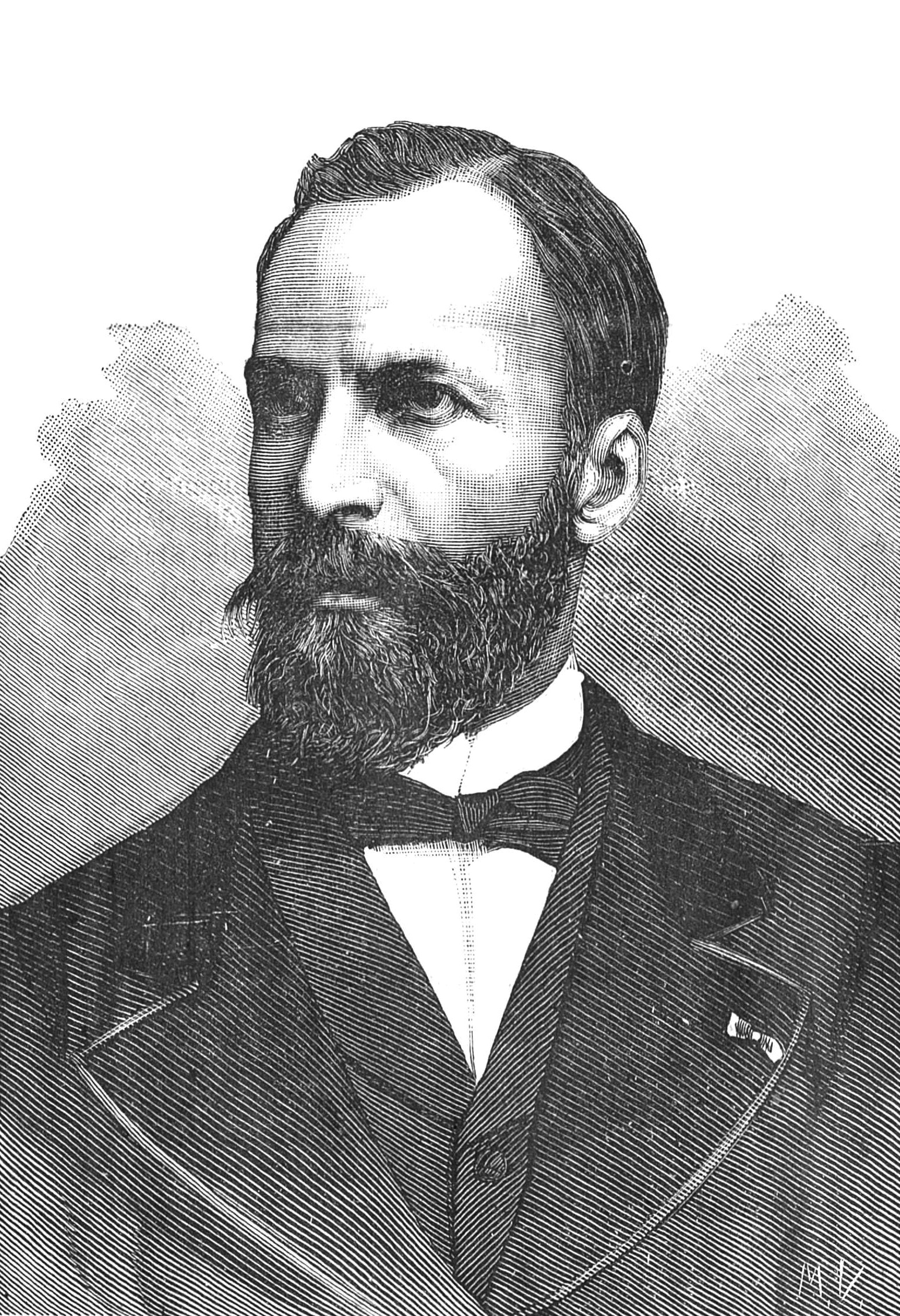 "M. Sainctelette".